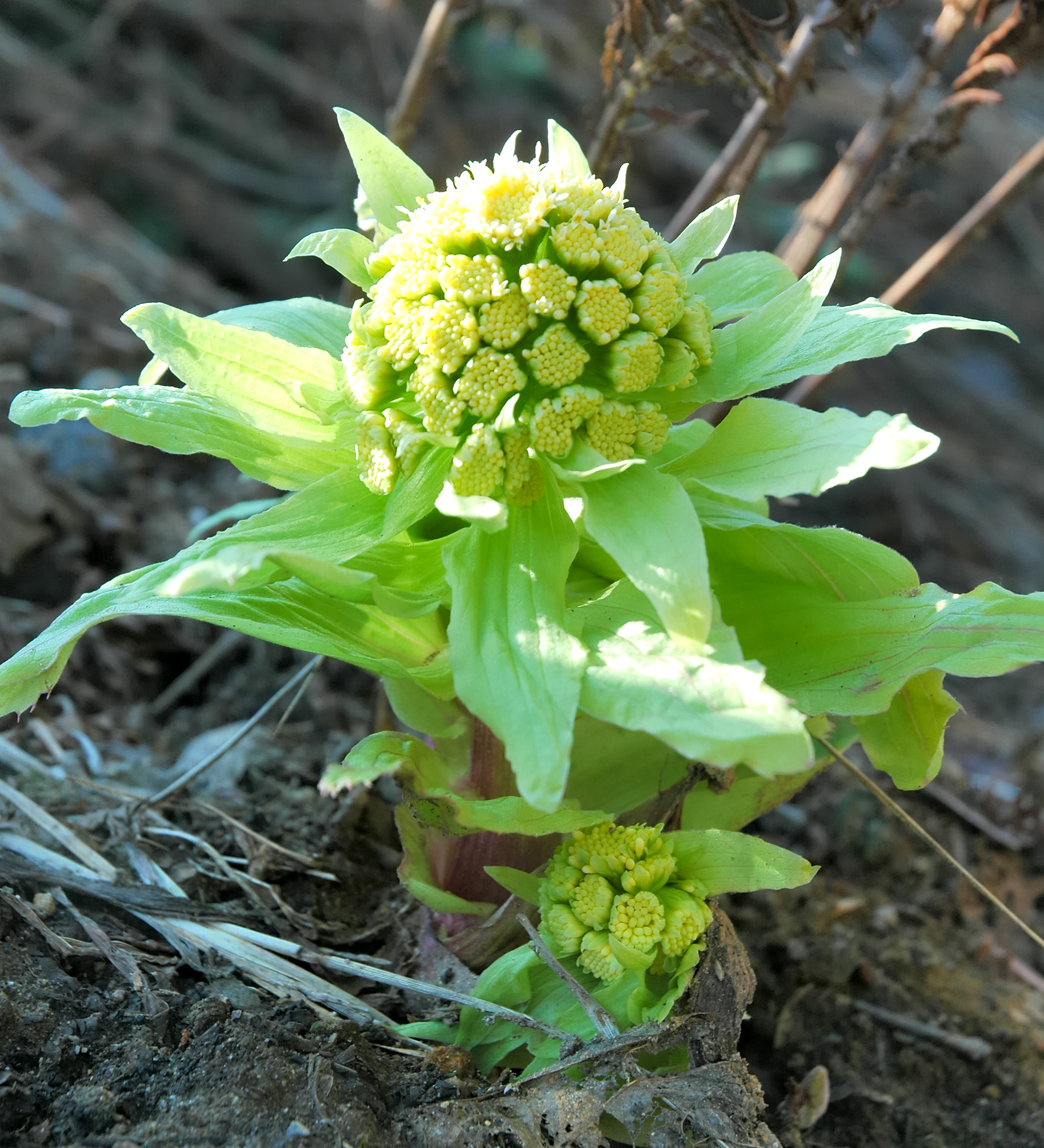 Petasites japonicus (Butterbur, フキノトウ)